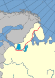 Železnice Petrohrad - Murmansk